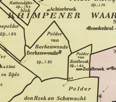 Polder_van_Berkenwoude